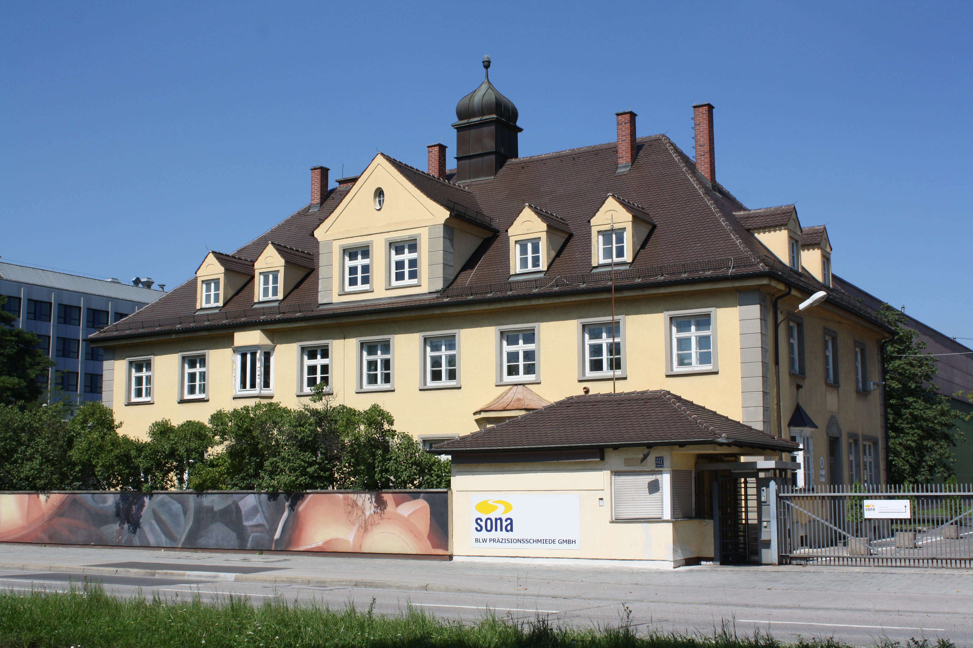 Verwaltungsbau Bayerisches Leichtmetallwerk, Frankfurter Ring 227